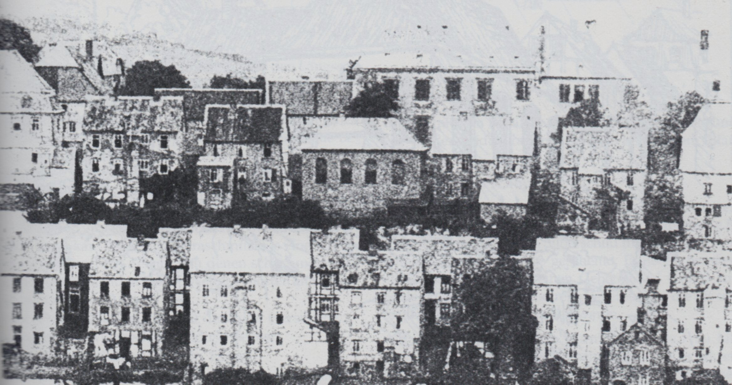 vergrößerte Ansicht von Arnsberg mit Synagoge